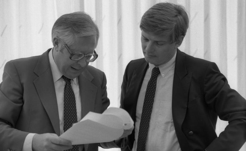 Ministerpräsidenten-Konferenz im Haus der Landesvertretung Rheinland-Pfalz.